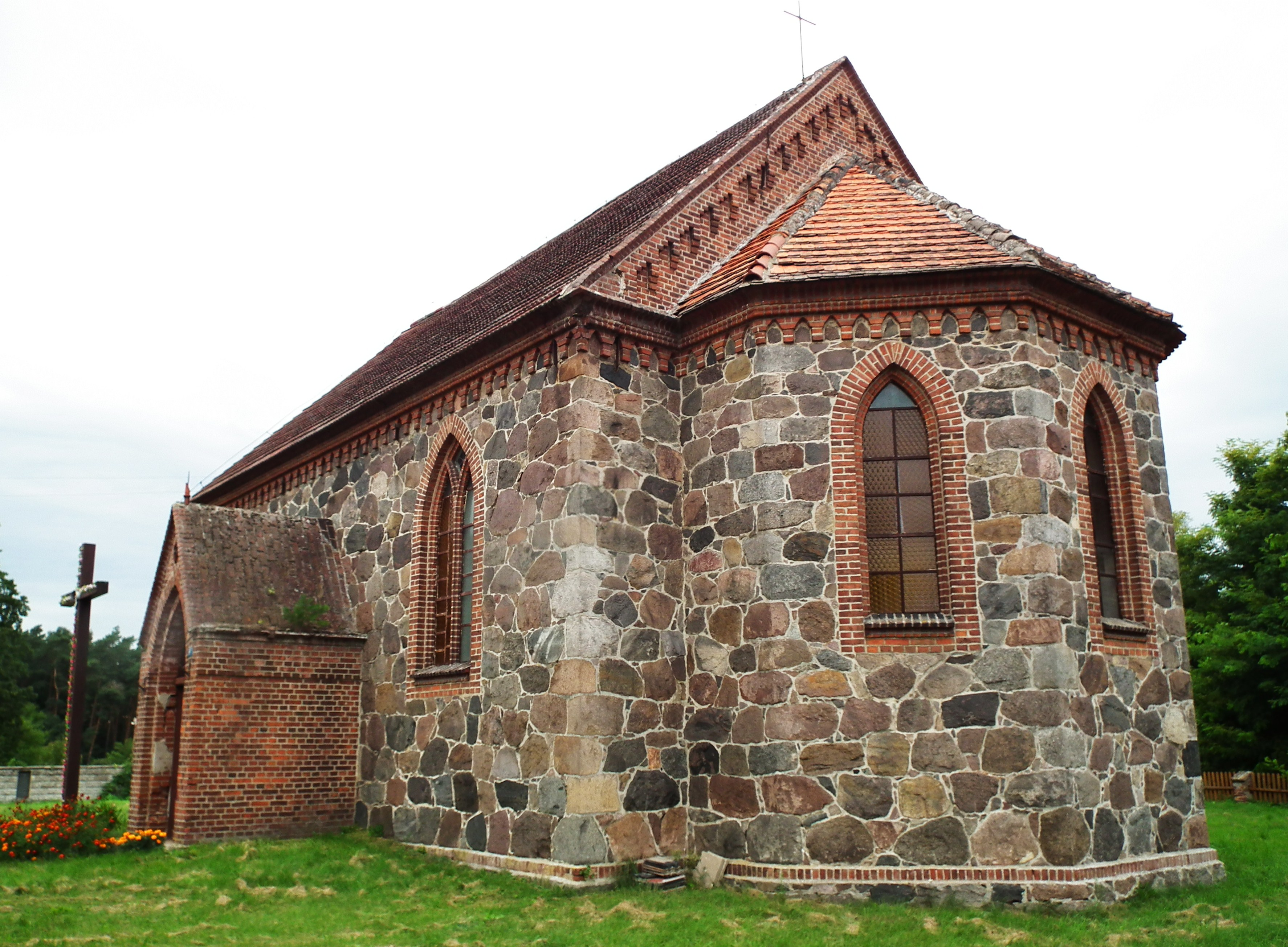 Kościół św. Józefa Oblubieńca w Grabnie koło Ośna Lub.